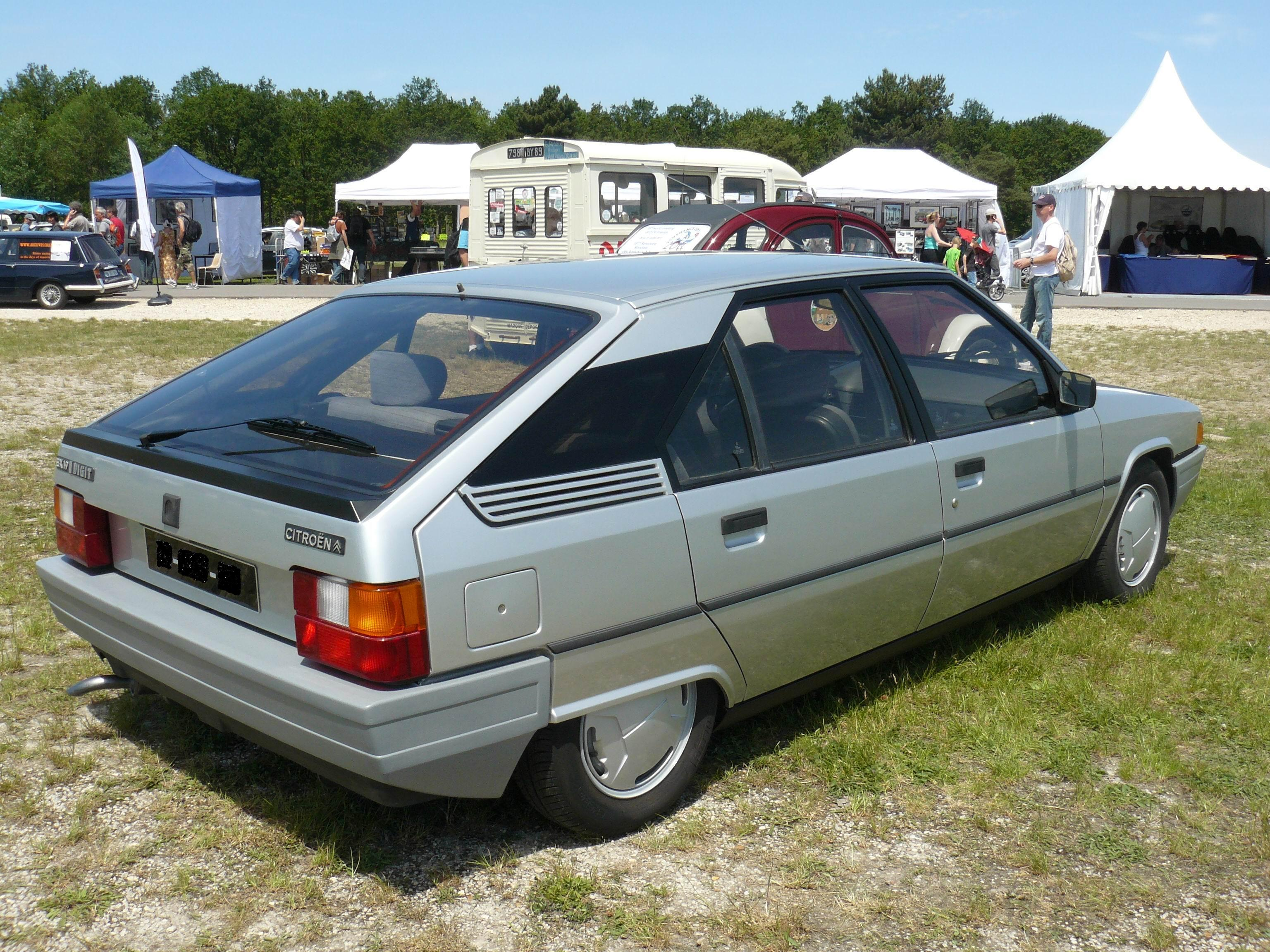 Monthlery 2012